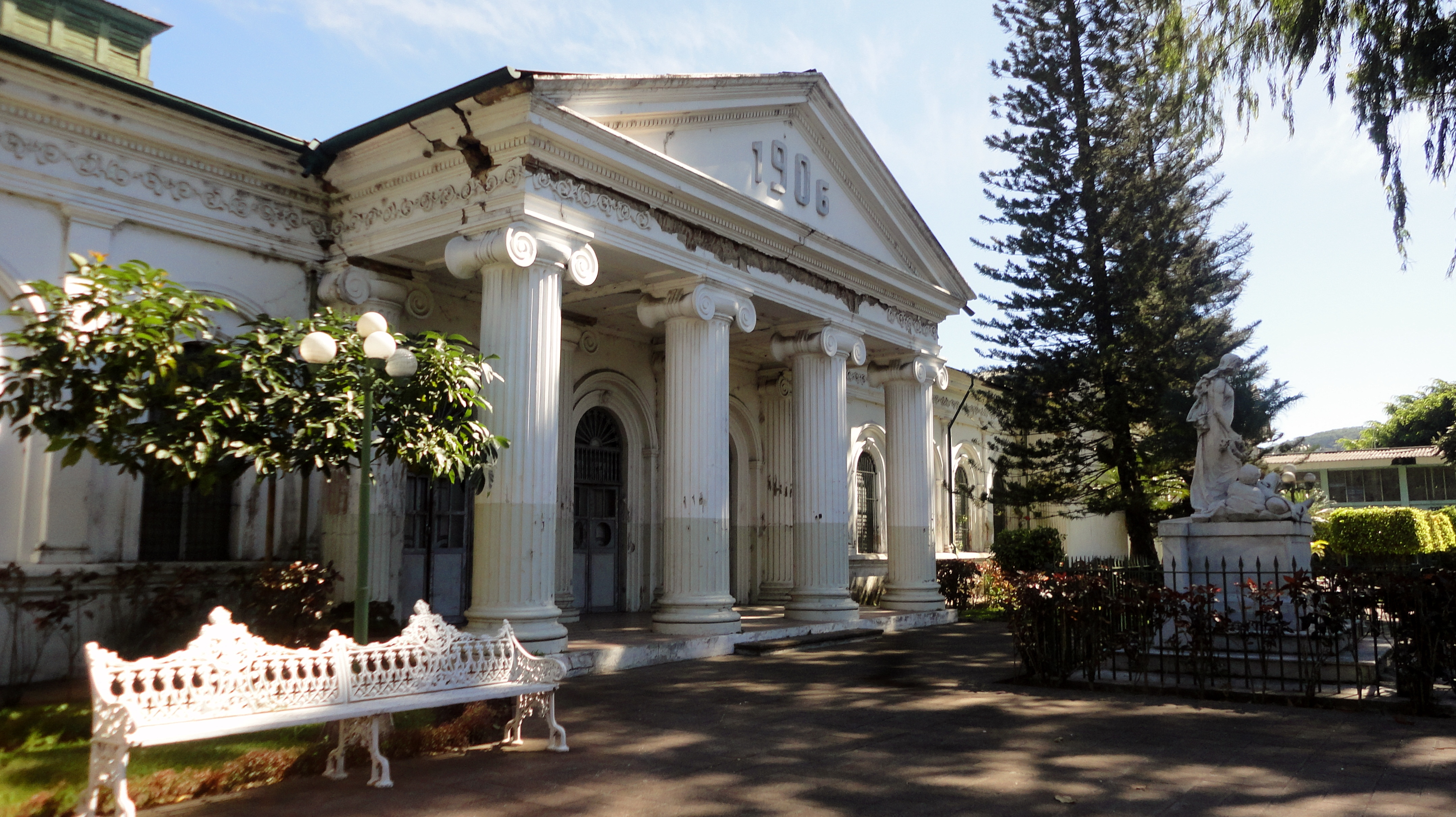 Perspectiva de facha principal.